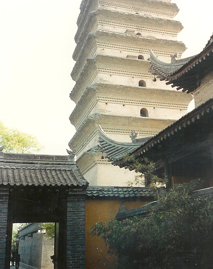 Wëll-Gäns-Pagod vu Xian